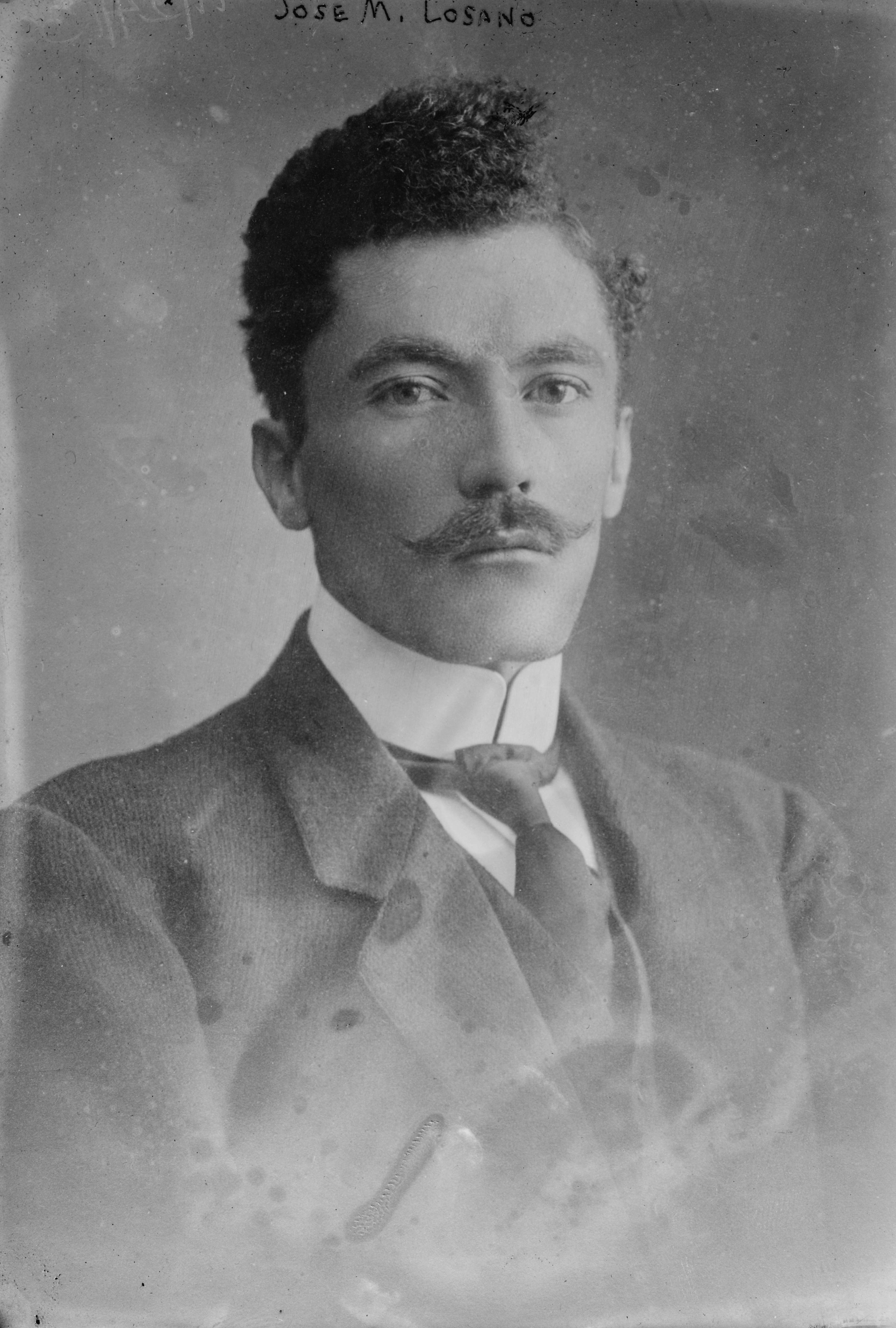 Depicted person: José María Lozano